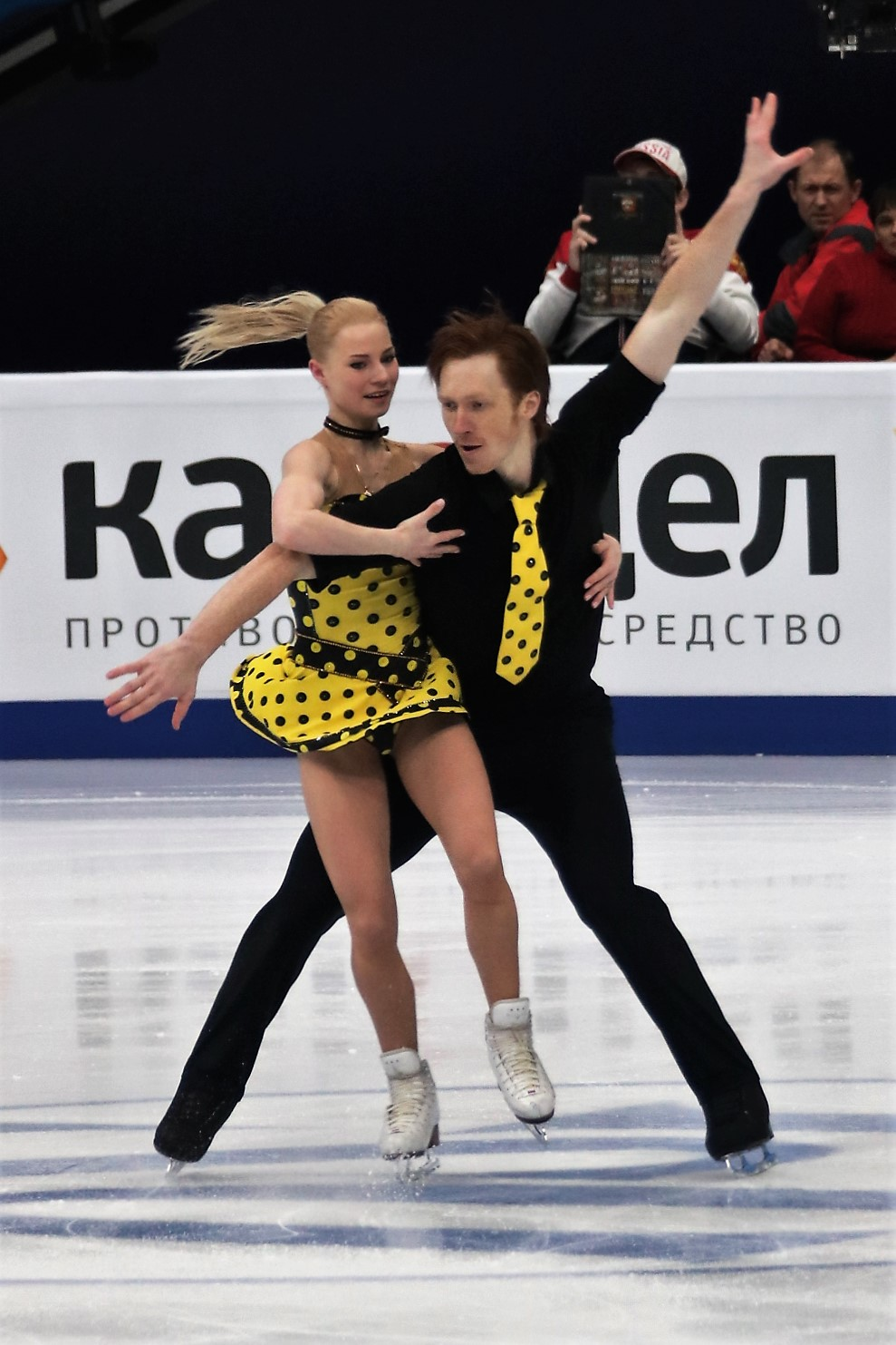 Евгения Тарасова / Владимир Морозов (Россия) на Чемпионате Европы по фигурному катанию 2018.